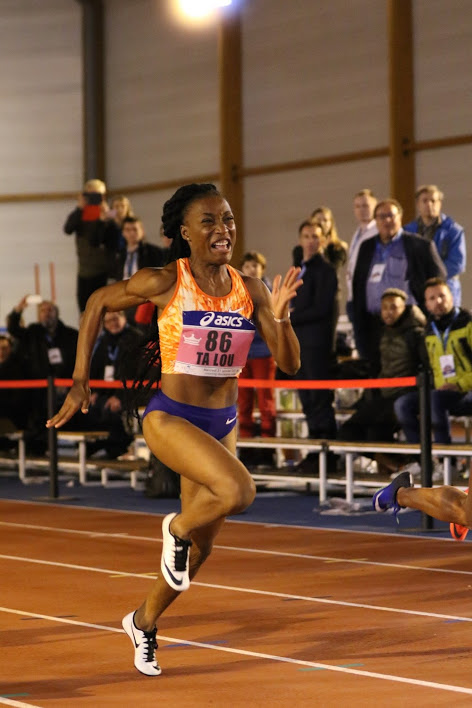 Marie-Josée Ta Lou, Meeting National des Sacres - 2018